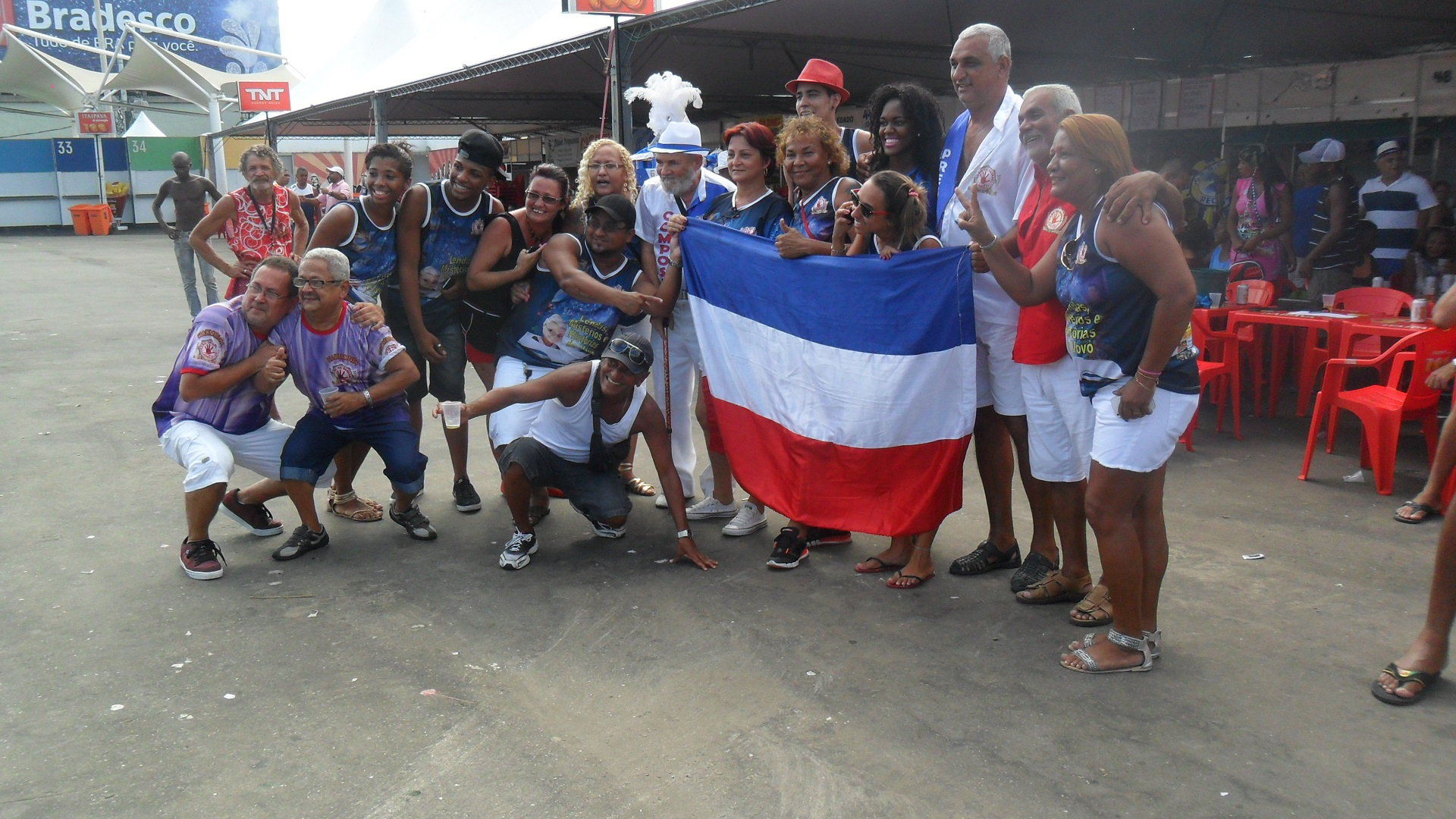 GRBC Vai Barrar Nunca